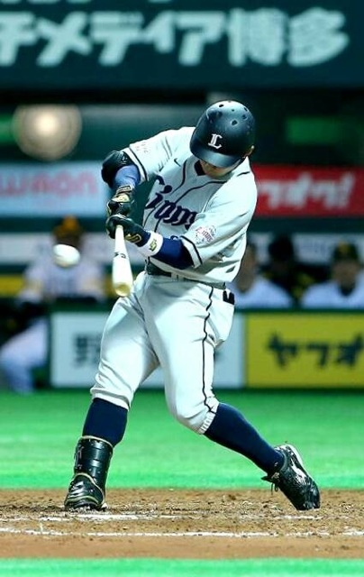 5/2 対ソフトバンクホークス戦 ヤフオクドーム 9回表ライト前ヒット